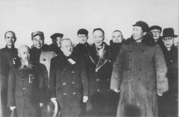 1949年3月25日，中共中央領導人毛澤東、朱德從河北省西柏坡到達北平，民主黨派負責人和民主人士到西苑機場歡迎。右起：馬敘倫、林伯渠、毛澤東、黃炎培、郭沫若、陳其瑗、李濟深、董必武、朱德、沈鈞儒、陆志韦。